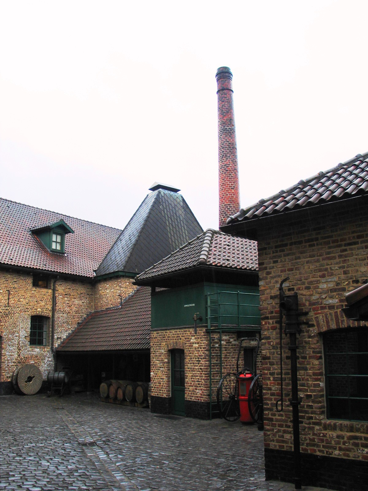 Mouttoren op het binnenplein van het Nationaal Jenevermuseum Hasselt - eigen foto